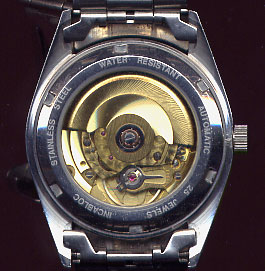 Automatik-Uhrwerk ETA 2824-2, selbst fotografiert. (Anmerkung: Bei dem Bild handelt es sich um eine Kopie eines ETA Uhrwerks. Echte ETA Uhrewerke sind Silber und nicht Bronze. Bronze ETA Uhrwerke werden meist in Asiatische Replika Uhren eingebaut und als echte ETA Uhrwerke ausgegeben.)